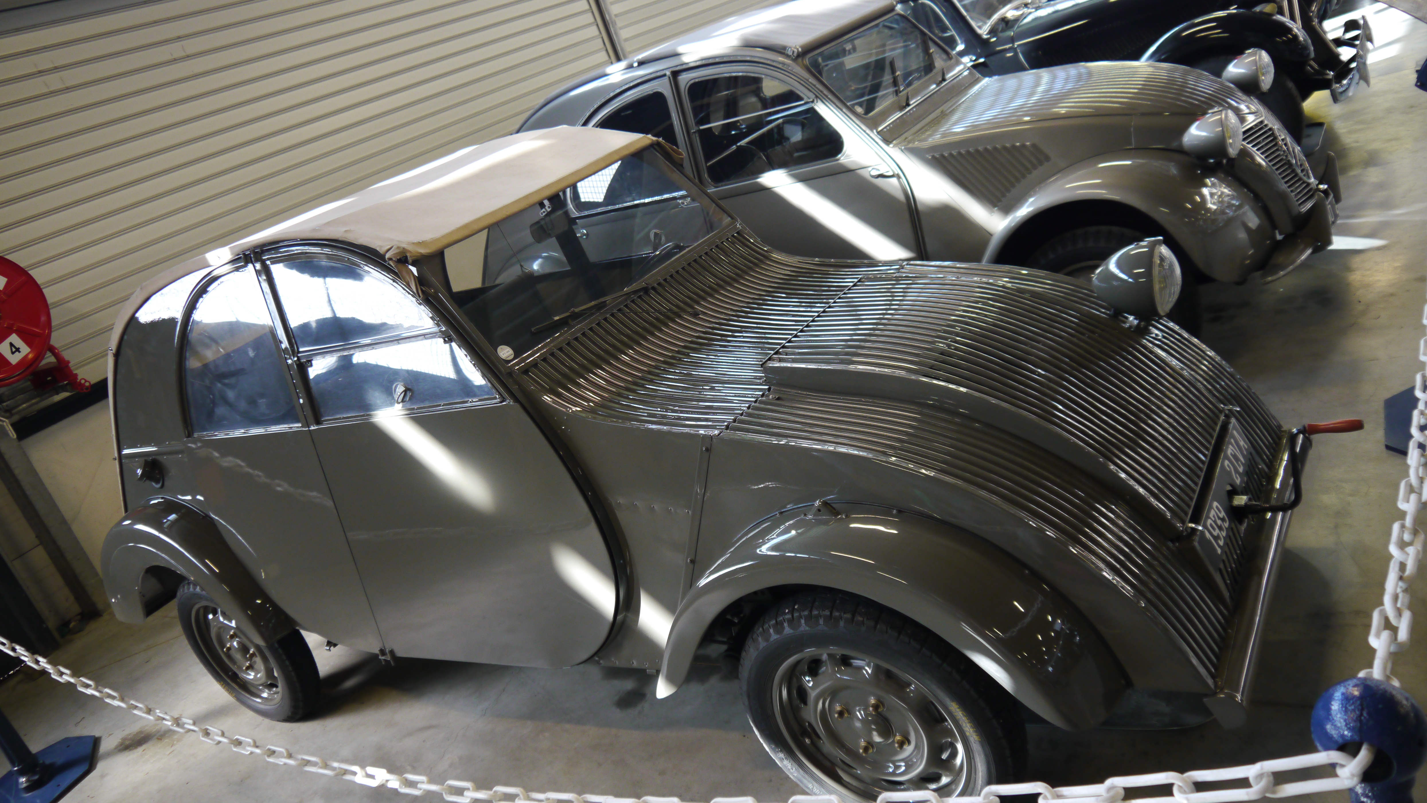 Conservatoire Citroen 073 Citroen 2CV